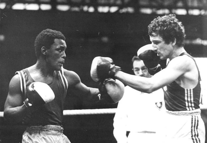 Jose Magallanes, Dietmar Schwarz ADN-ZB Lehmann.9.3.83 Halle: XII. Internationales Boxturnier um den Chemiepokal - DDR-Halbweltergewichtler Dietmar Schwarz (r) zwang seinen Gegner Jose Magallanes (Venezuela) zur Aufgabe in der dritten Runde und erreichte damit das Halbfinale.